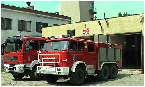 Ochotnicza Straż Pożarna w Pilawie